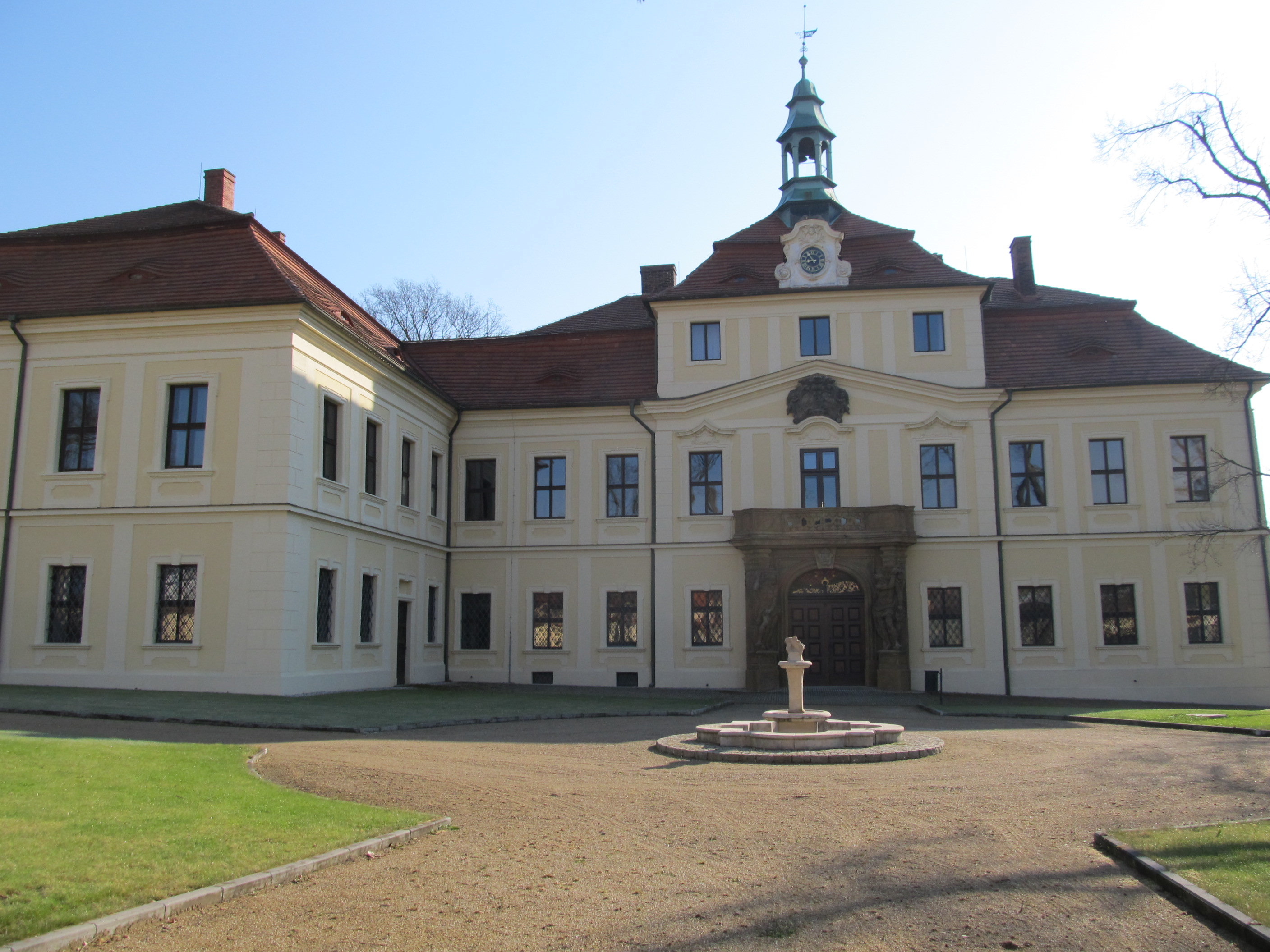 Mirošov - zámek